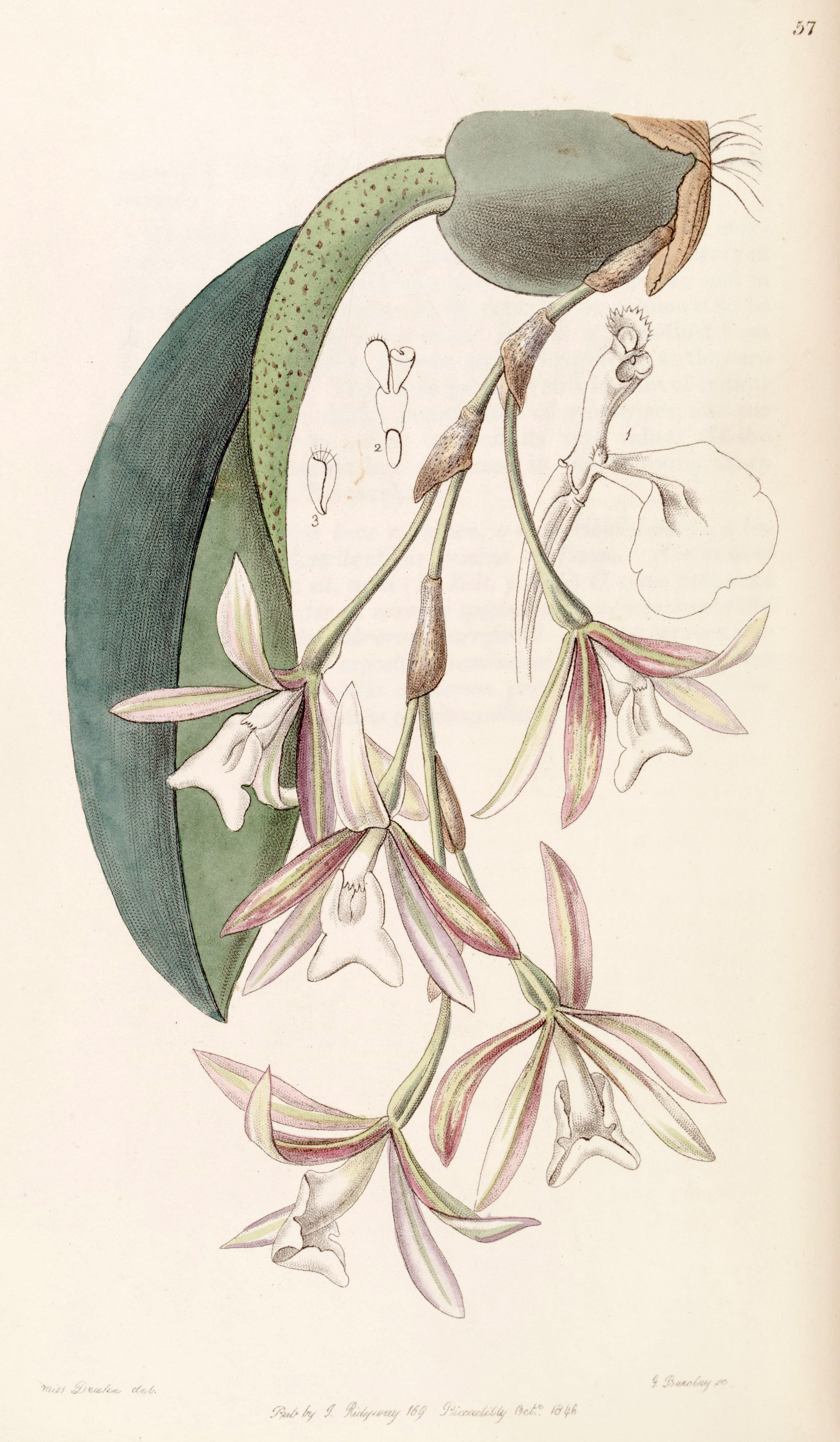 Trichopilia laxa (as syn. Pilumna laxa)